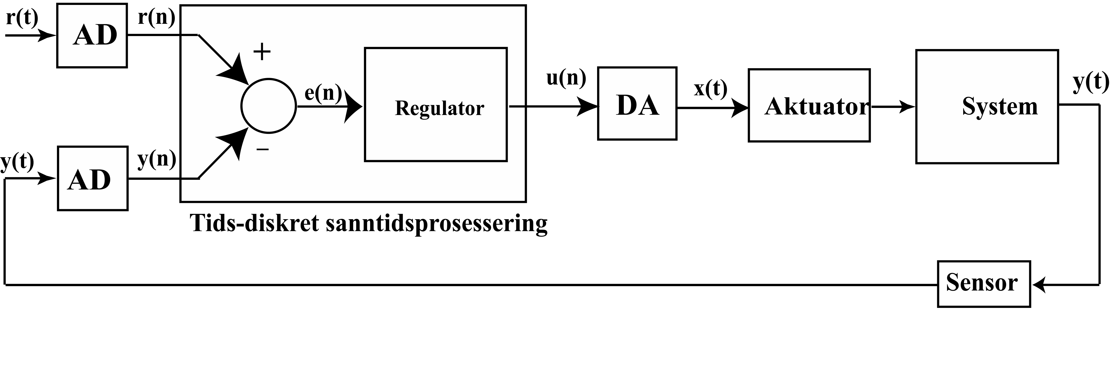 Tids-diskret reguleringssløyfe